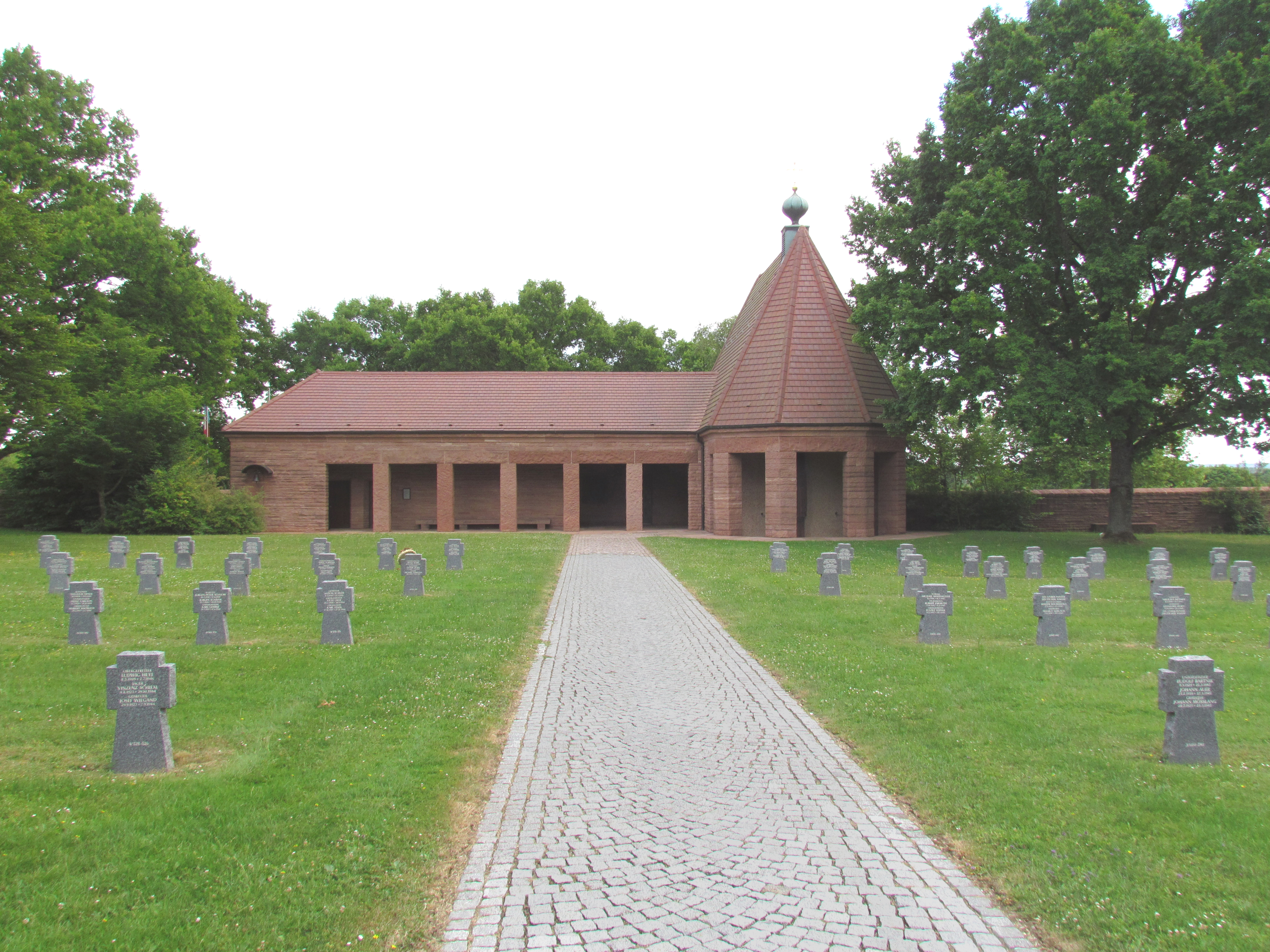 Bildinhalt: Deutscher Soldatenfriedhof in Andilly, Meurthe-et-Moselle. Gräberfeld mit Eingangshalle Aufnahmeort: Andilly, Meurthe-et-Moselle, Frankreich